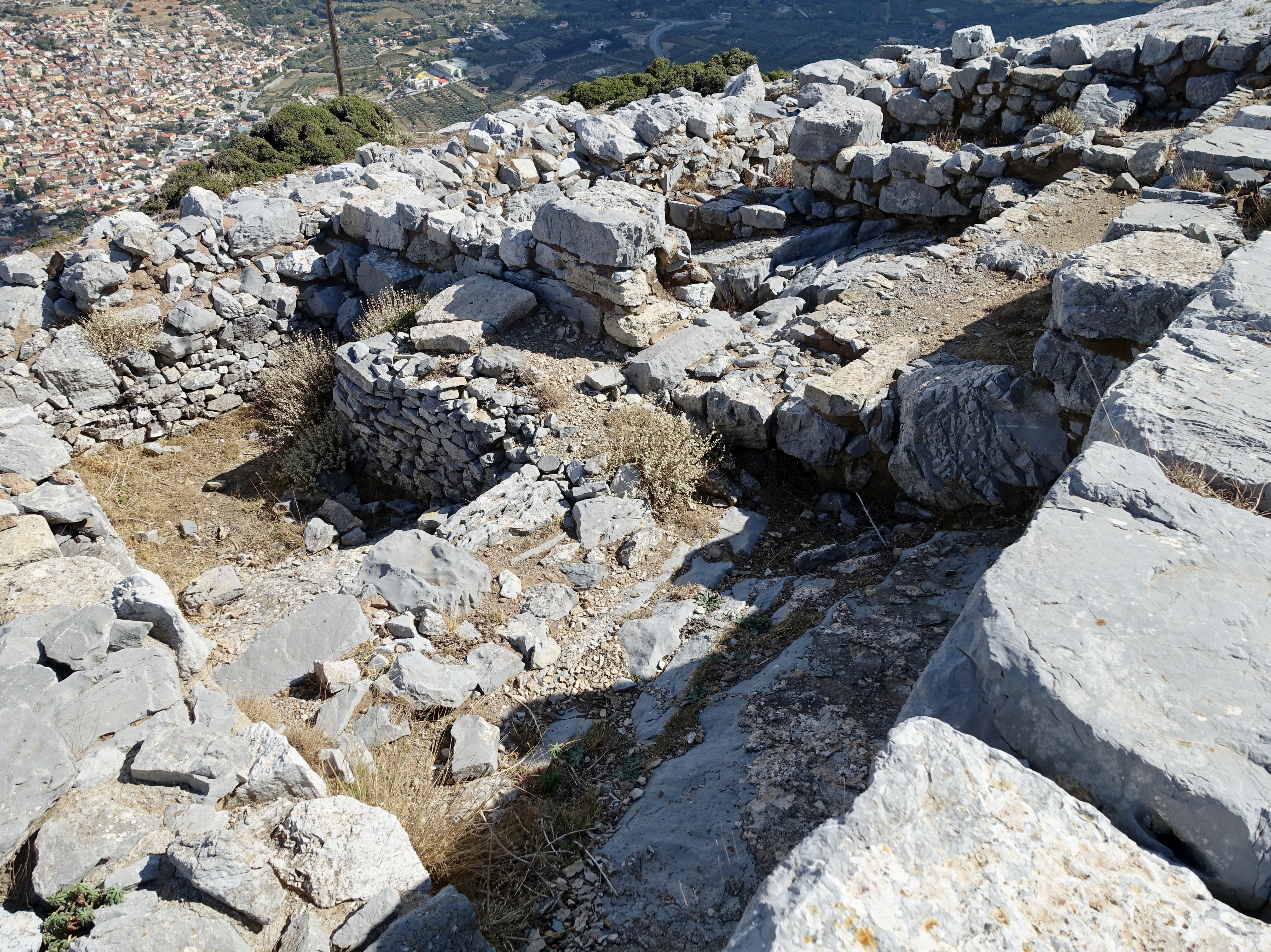 Minoisches Gipfelheiligtum auf dem Giouchtas (Γιούχτας), Kreta, Griechenland